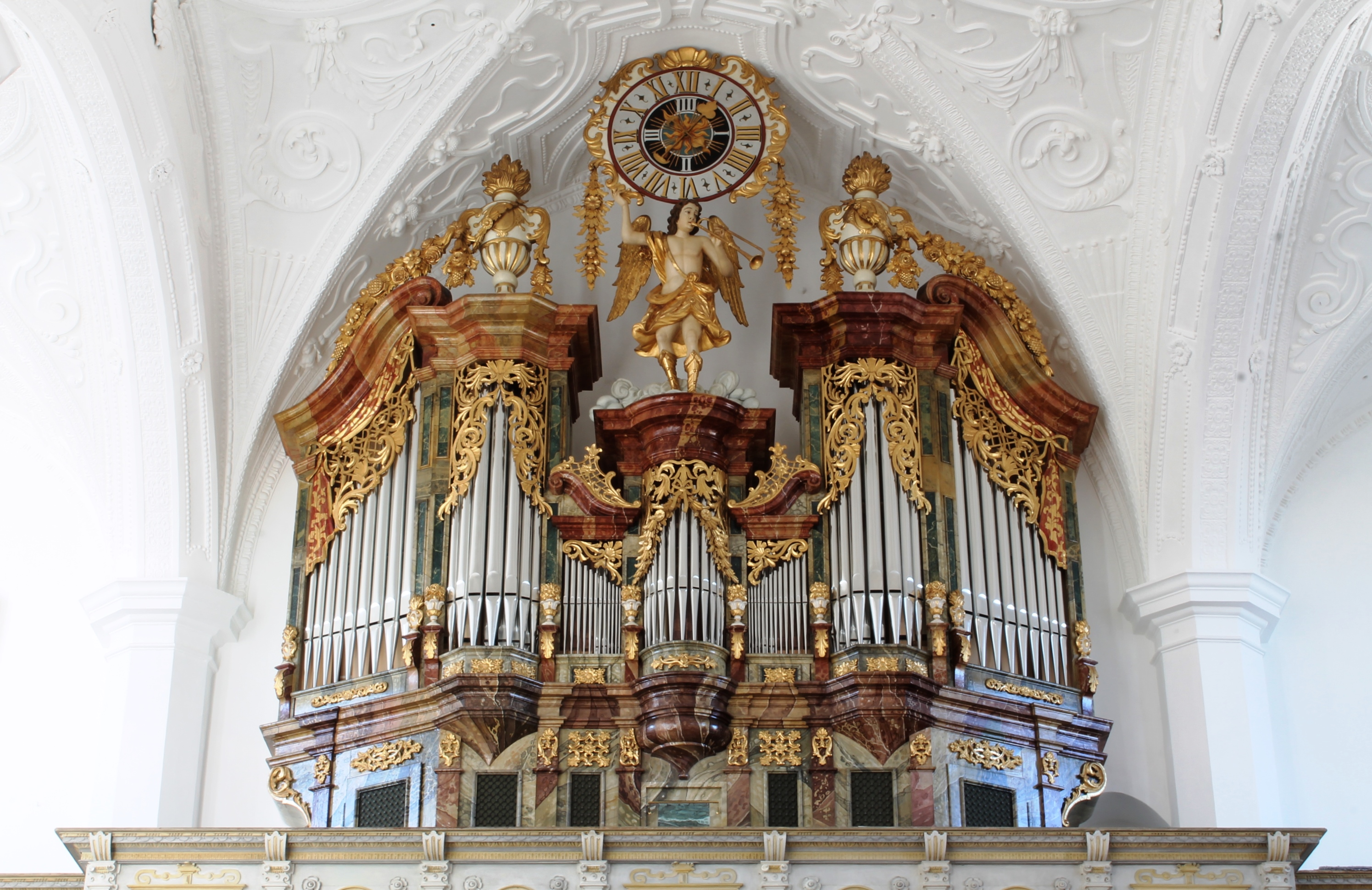 Alois Linder-Orgel 2019 im Gehäuse von Johann Andreas Fux aus dem Jahre 1749